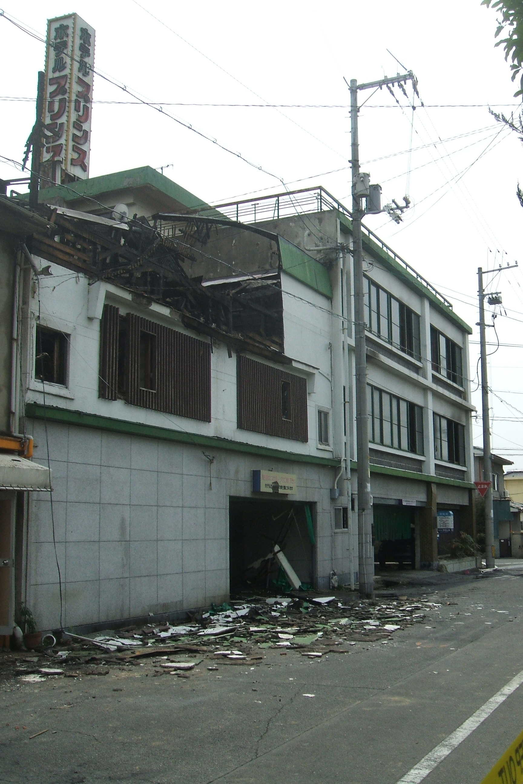 2012年5月13日に広島県福山市西桜町で発生したホテル火災現場の 東側木造部分を中心に撮影